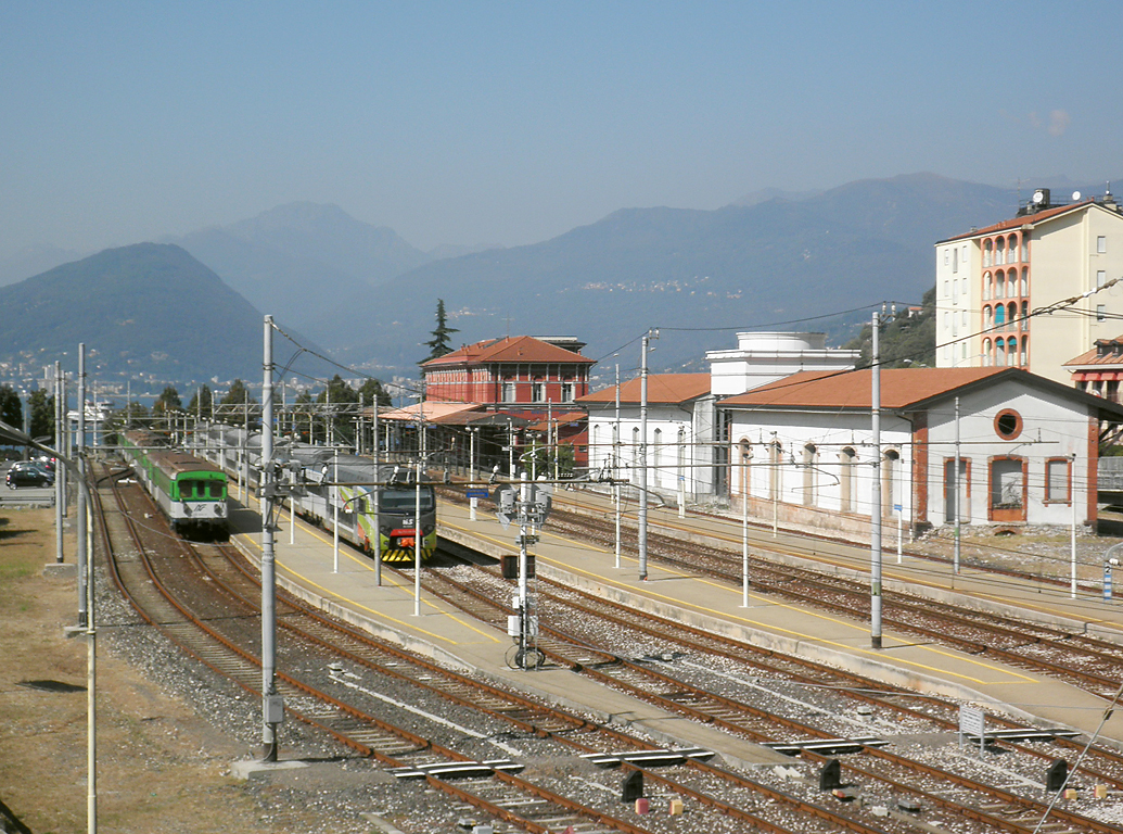 Vista panoramica della stazione di Laveno-Mombello delle Ferrovie Nord Milano